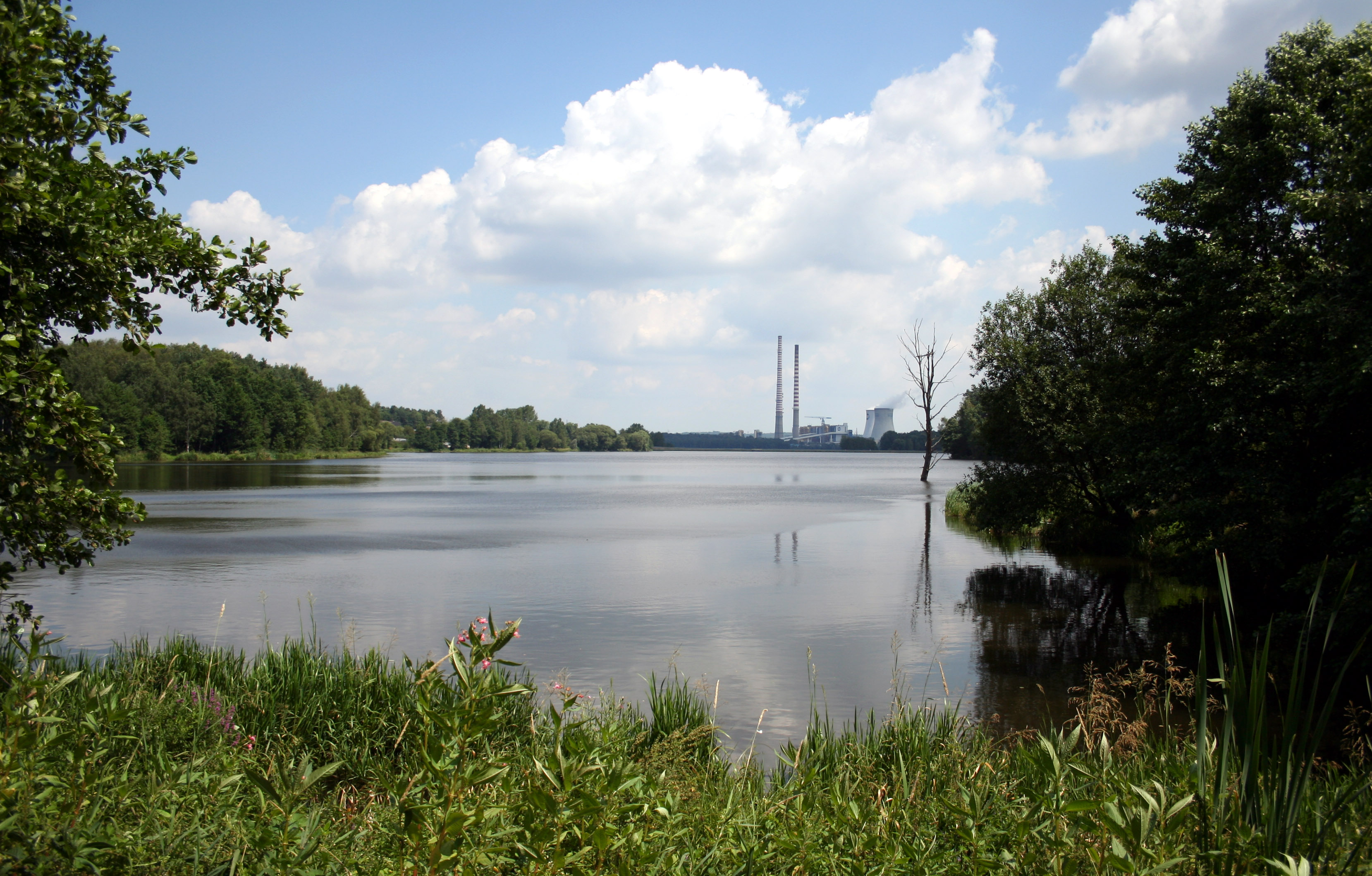 Gzel, odnoga Zalewu Rybnickiego